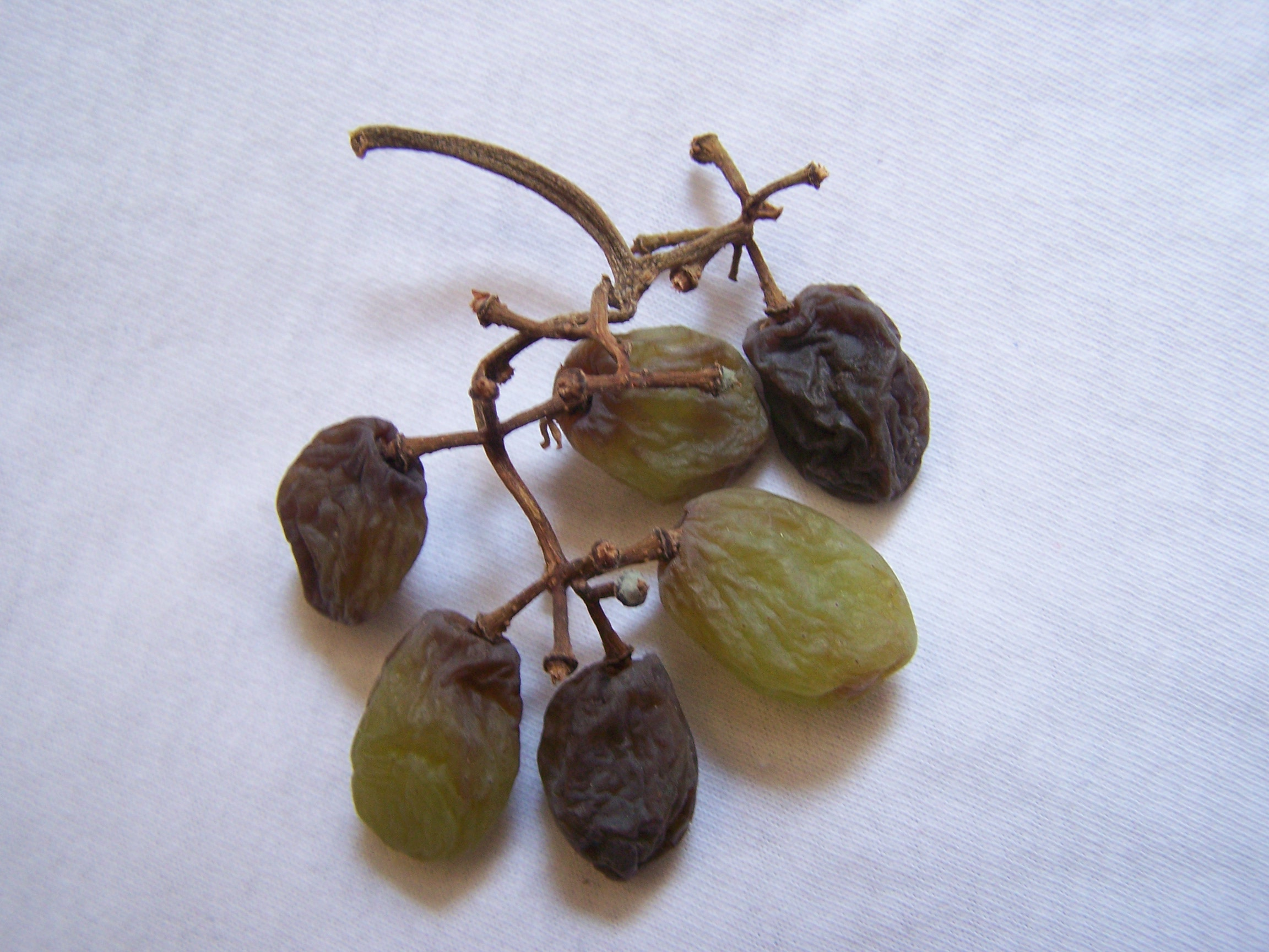 Uvas en proceso de deshidratación